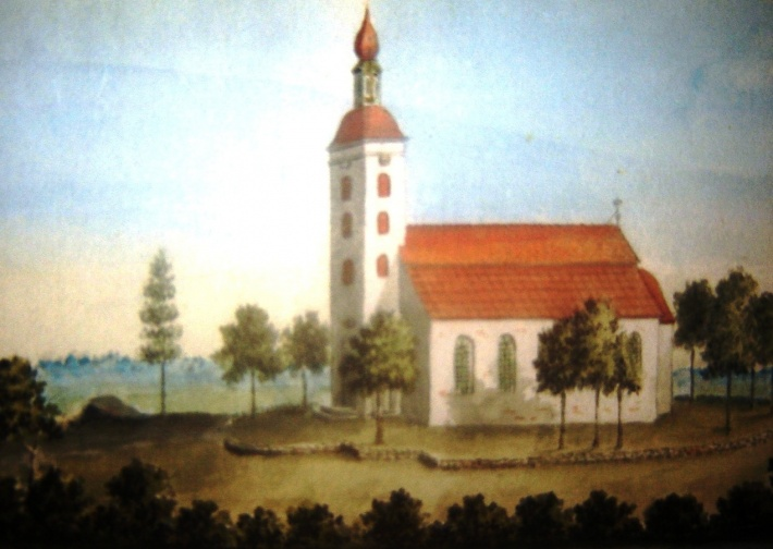 Nitaure linnuse serva 1770ndatel rajatud luteri kirik.